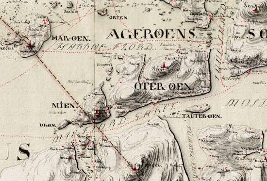 Sjøkart over Møre og Romsdal og deler av Sør-Trøndelag, fra Brattvåg i Møre og Romsdal til Halten i Sør-Trøndelag, fra 1788. Håndtegnet i omtrentlig målestokk 1:20 000 av Vibe. Original kartstørrelse ca 114 cm x 115 cm. Et eksemplar befinner seg hos Statens kartverk Sjø i Stavanger.